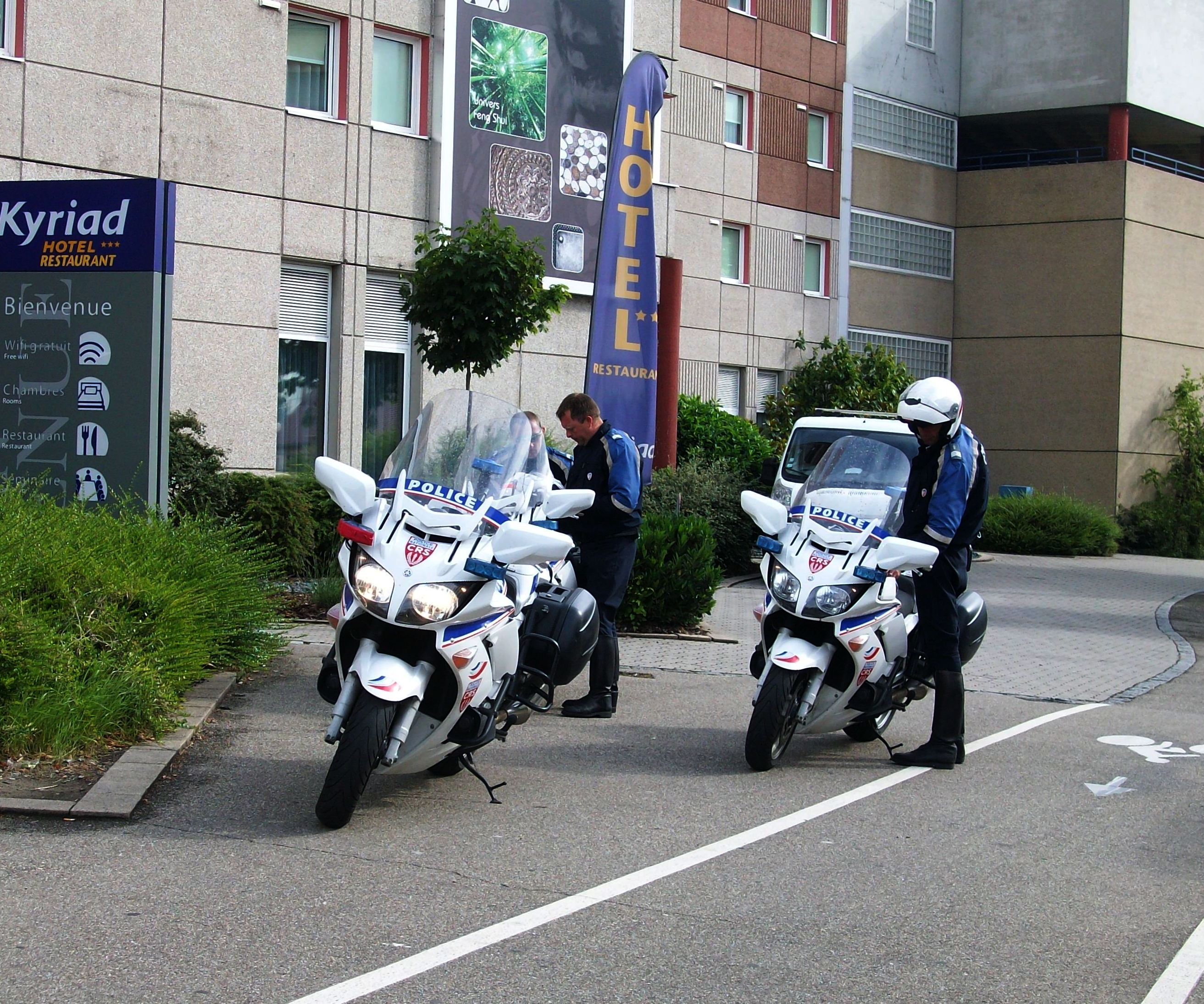 Motards de la compagnie républicaine de sécurité, à Schiltigheim.